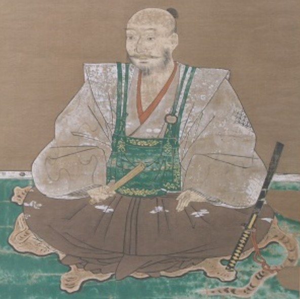 佐野昌綱の肖像。